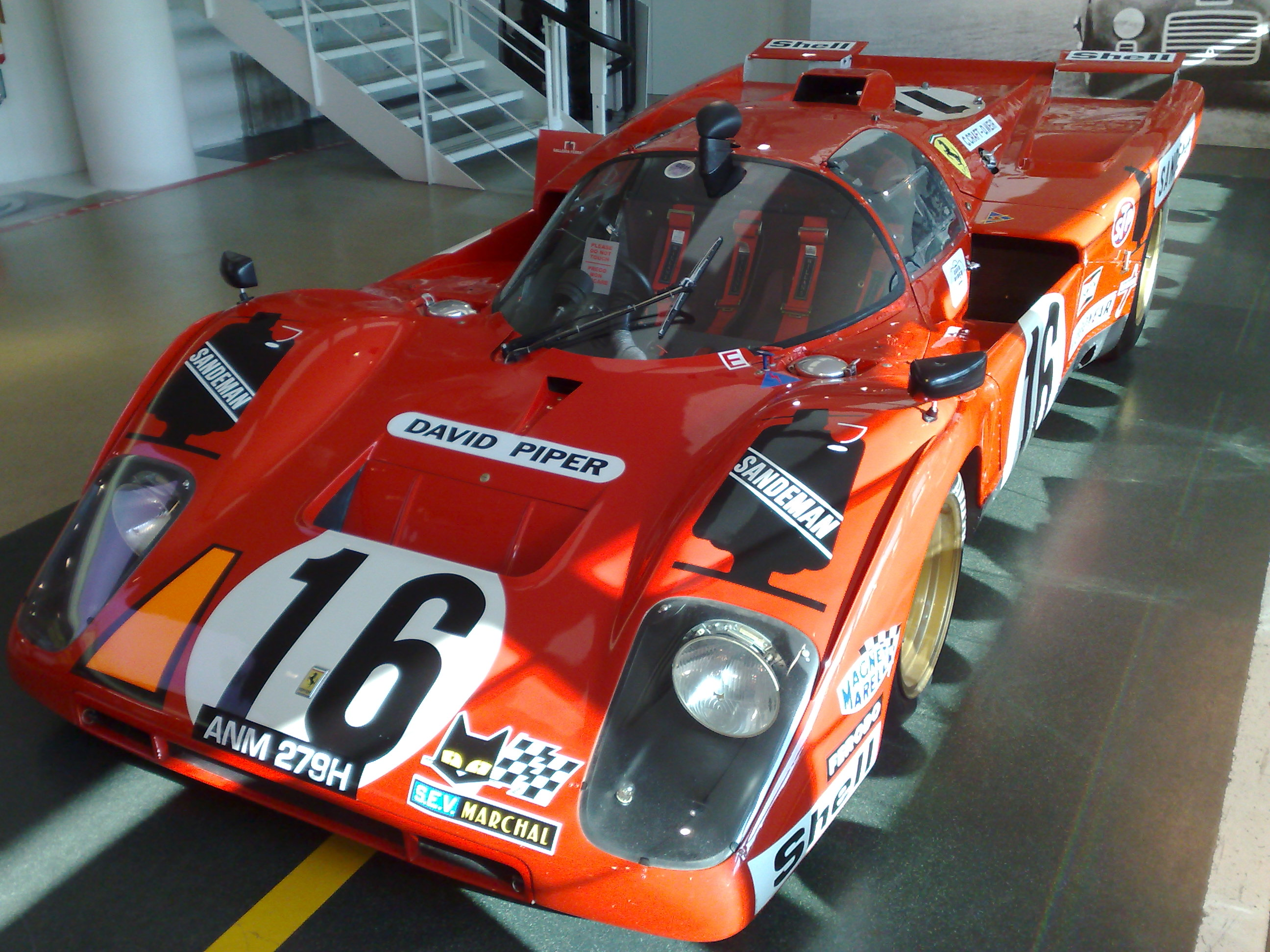 Ferrari 512M, Galleria Ferrari, Maranello